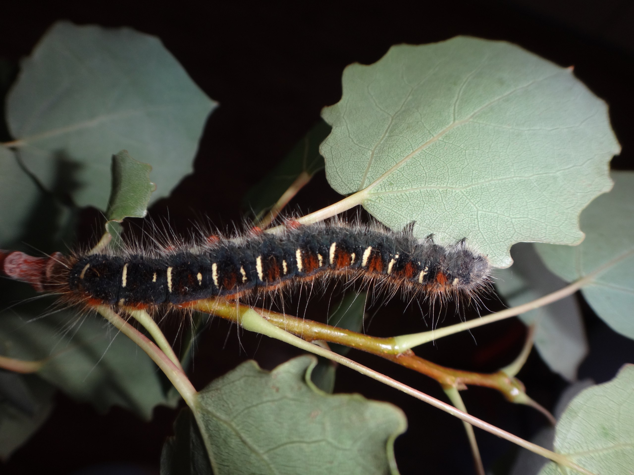 Гусеница пушистого коконопряда